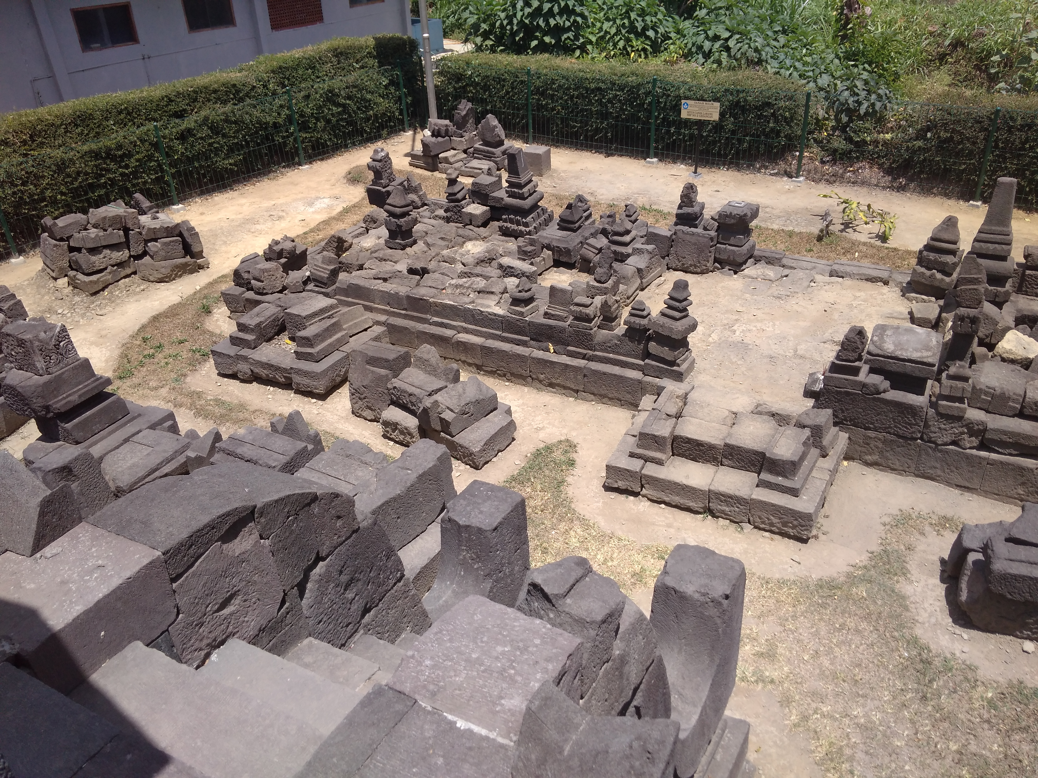 Reruntuhan candi perwara di kompleks Candi Lawang